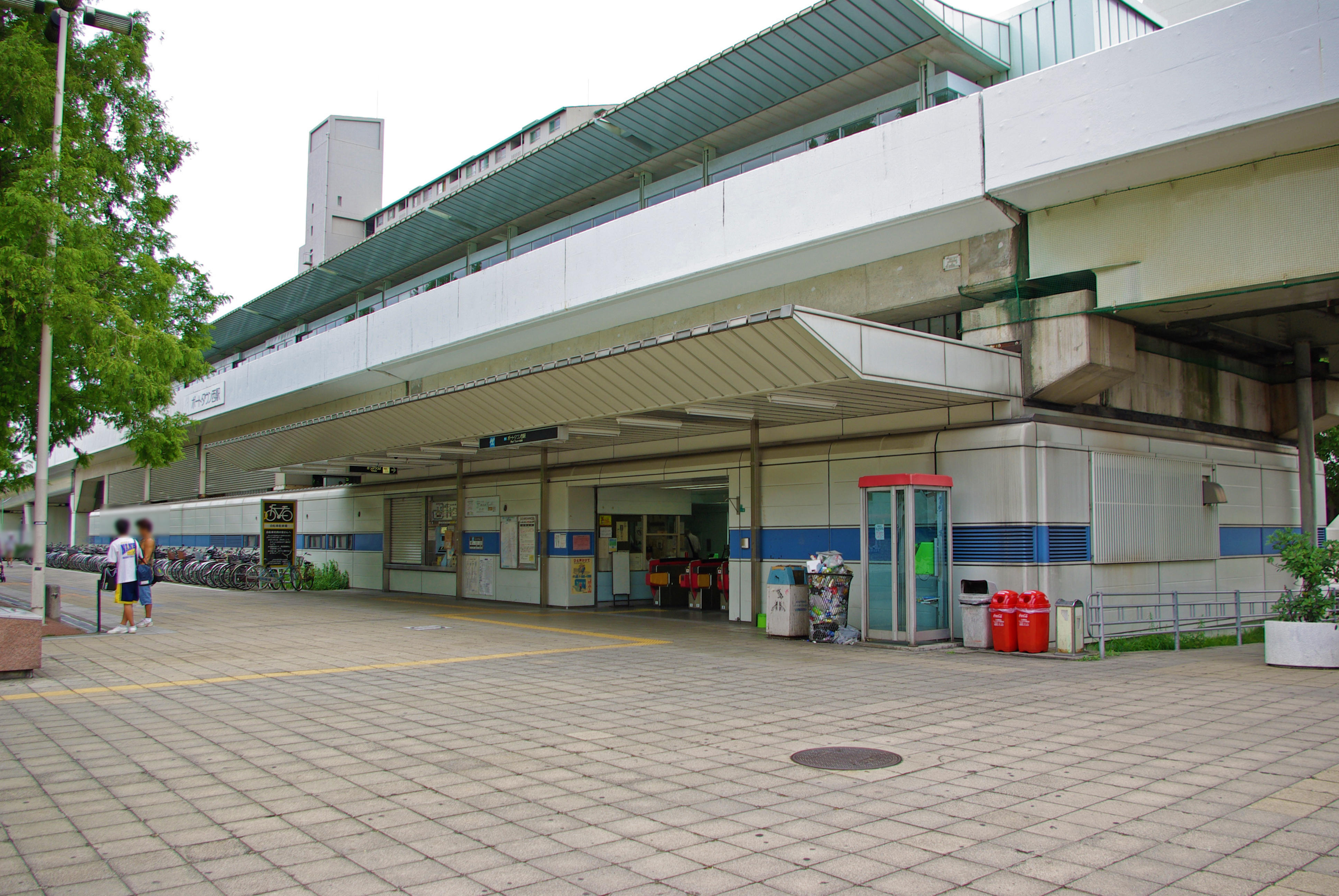 大阪市交通局南港ポートタウン線ポートタウン西駅